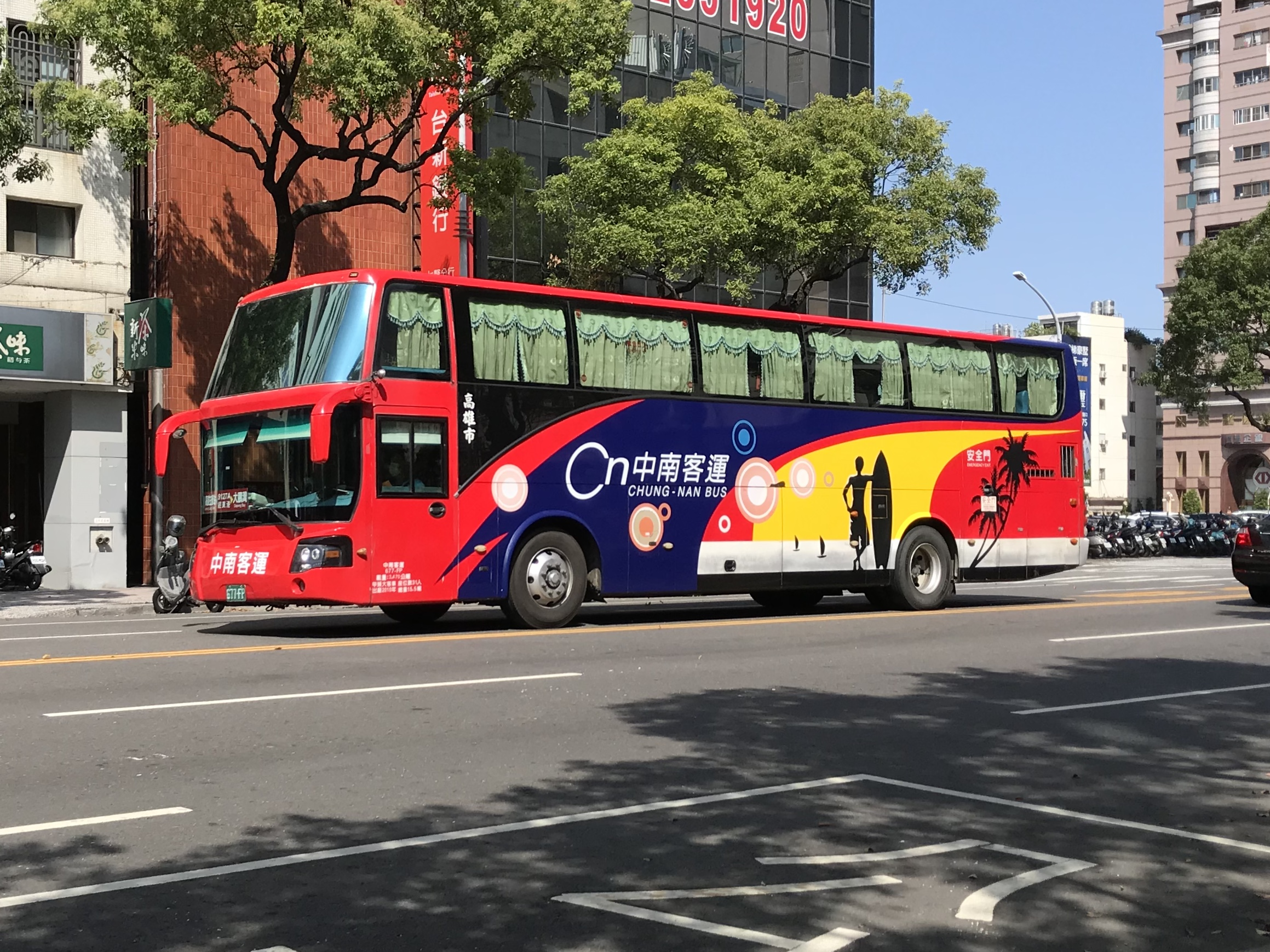 中南客運 9127A 677-FP